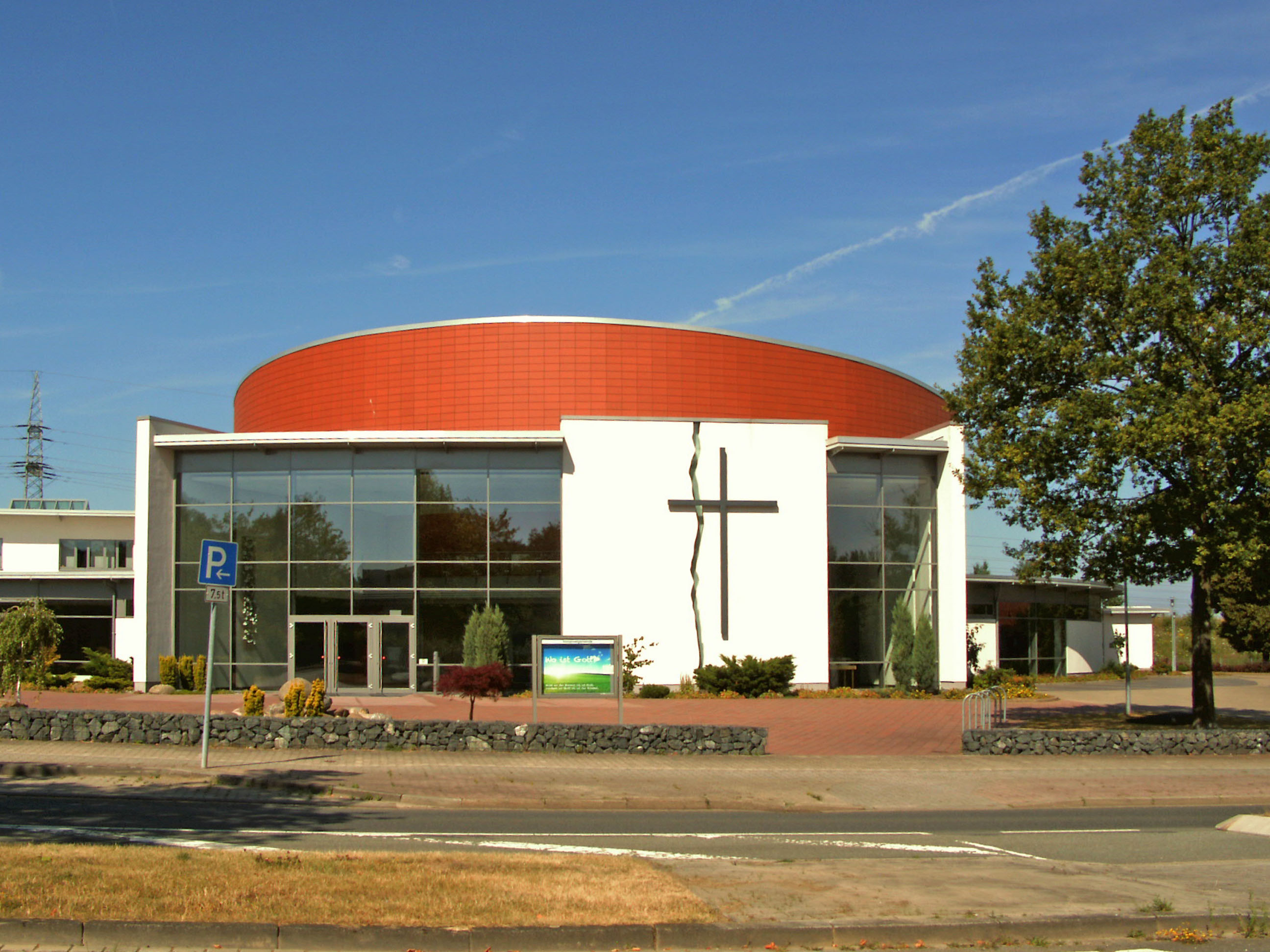 Kirche der Immanuelgemeinde in Wolfsburg, Stadtteil Westhagen